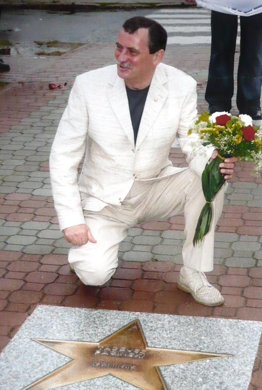 Aleja gwiazd we Władysławowie VI edycja (2005), Tadeusz Pagiński.